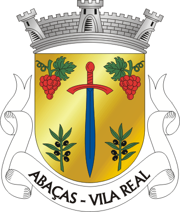 Brasão da freguesia de Abaças (concelho de Vila Real)